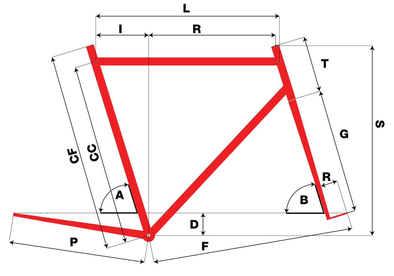 schema illustrativo della geometria di una bicicletta. ho modificato il file originale per renderlo più generico.